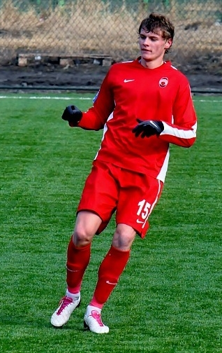 Роман Емельянов — российский футболист.